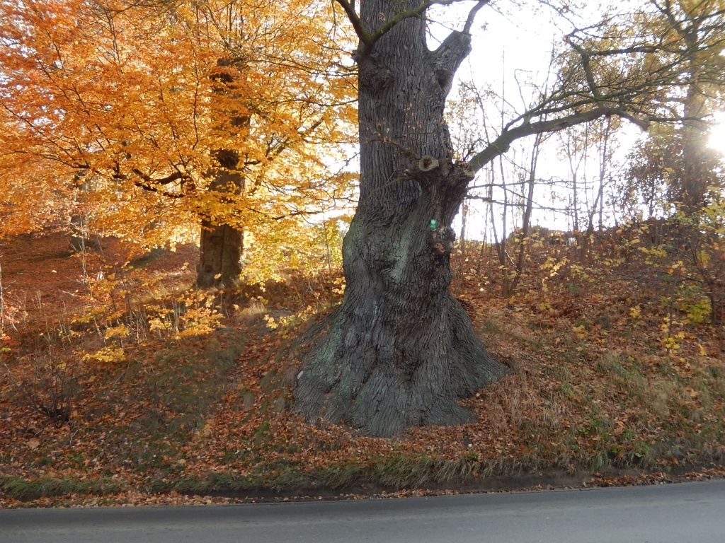 551 Dąb szypułkowy - pomnik przyrody - na skarpie ul. Niepołomicka